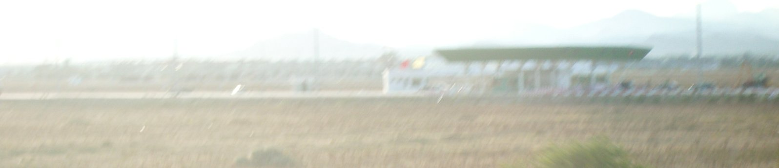 autoroute de la costa